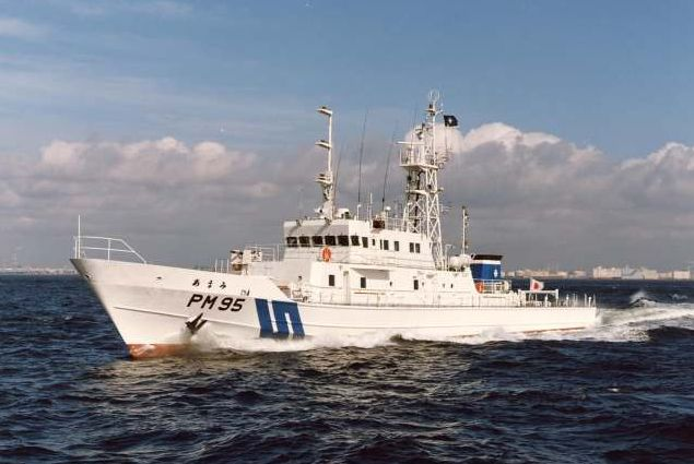 あまみ型巡視船「あまみ」